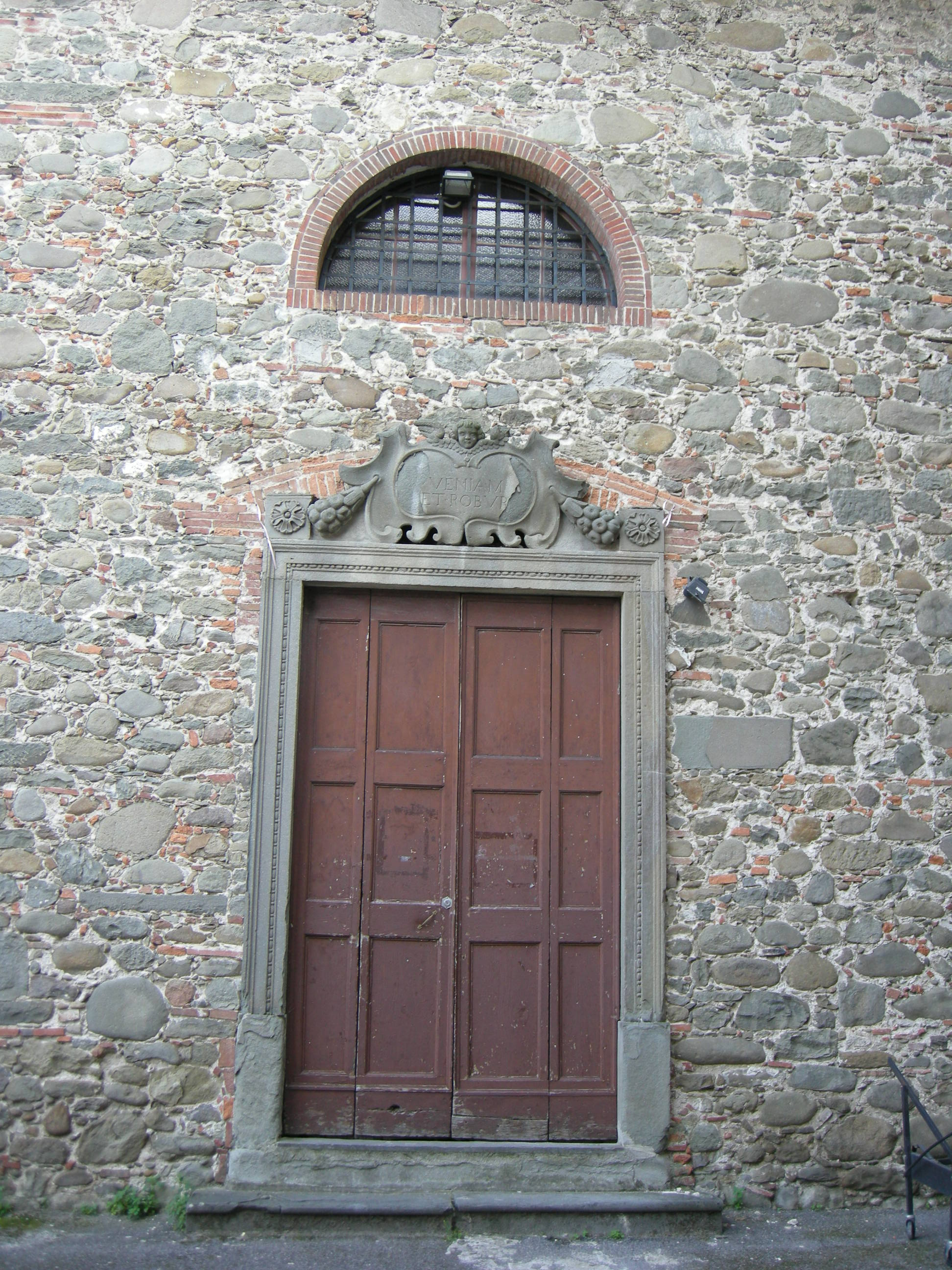 Pescia, chiesa di santa maria assunta 03 portale